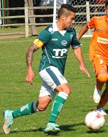 Fotografía de Matías Fernández Cordero, jugador de fútbol profesional, perteneciente al Santiago Wanderers de Chile